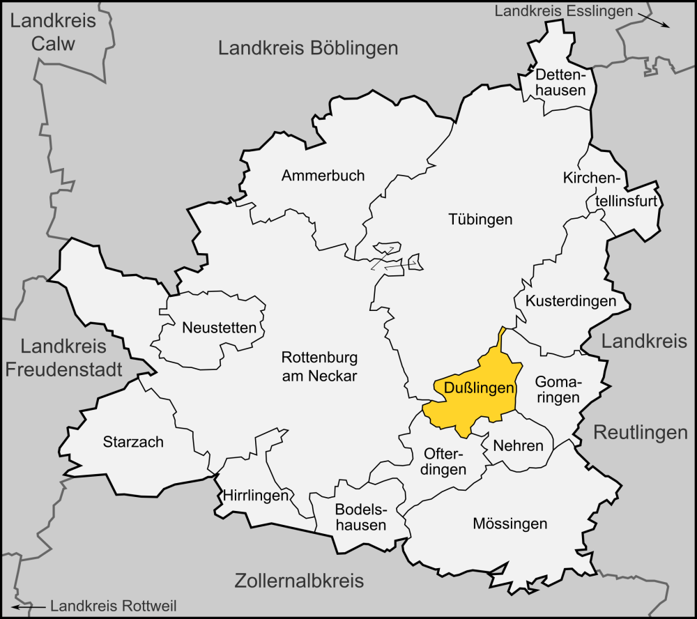 Karte der Gemeinde Dußlingen im Landkreis Tübingen